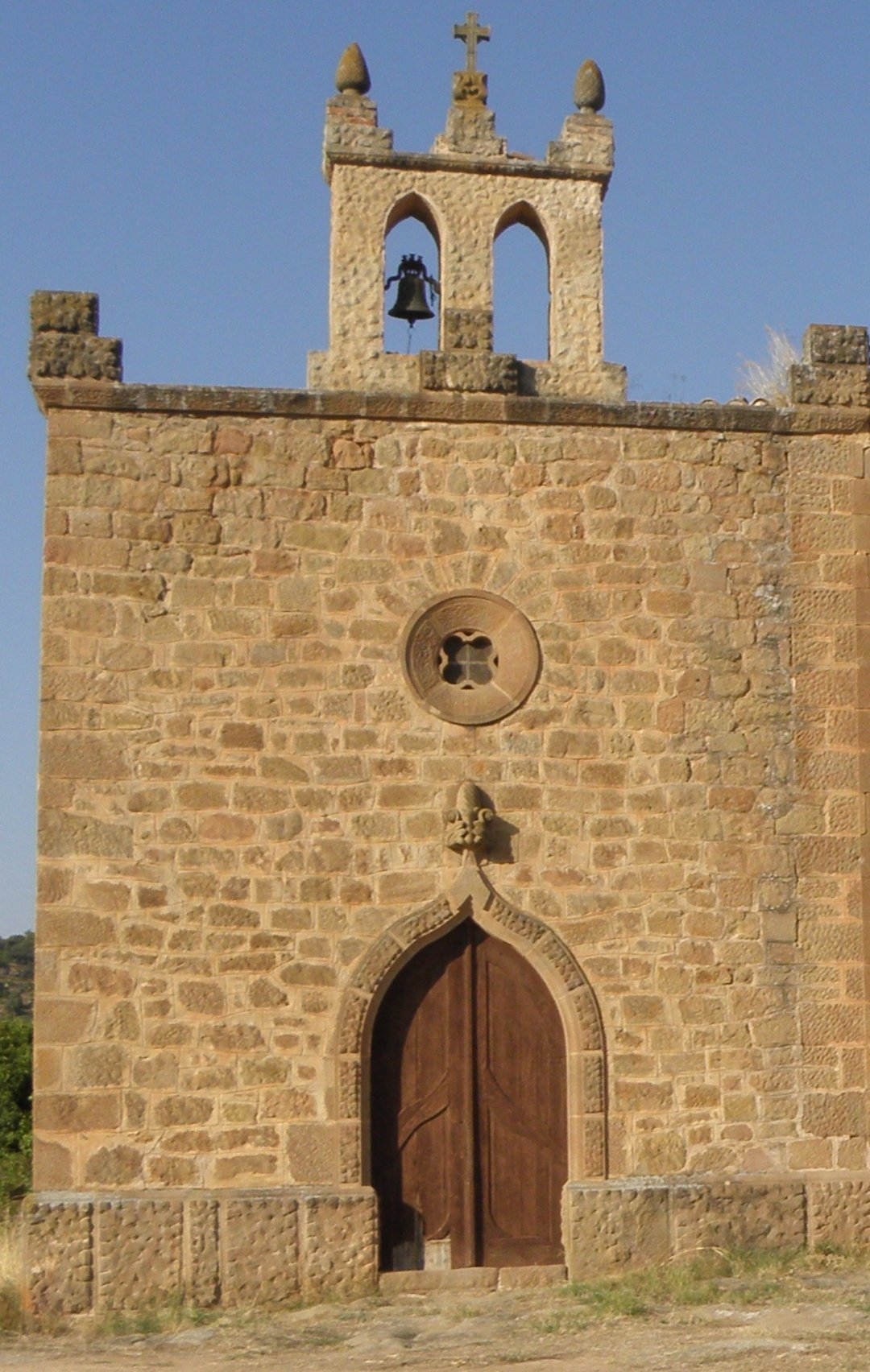 La façana principal (sud) de l'església nova de Sant Jaume, al poble de Sallent (municipi de Sallent de Solsonès).